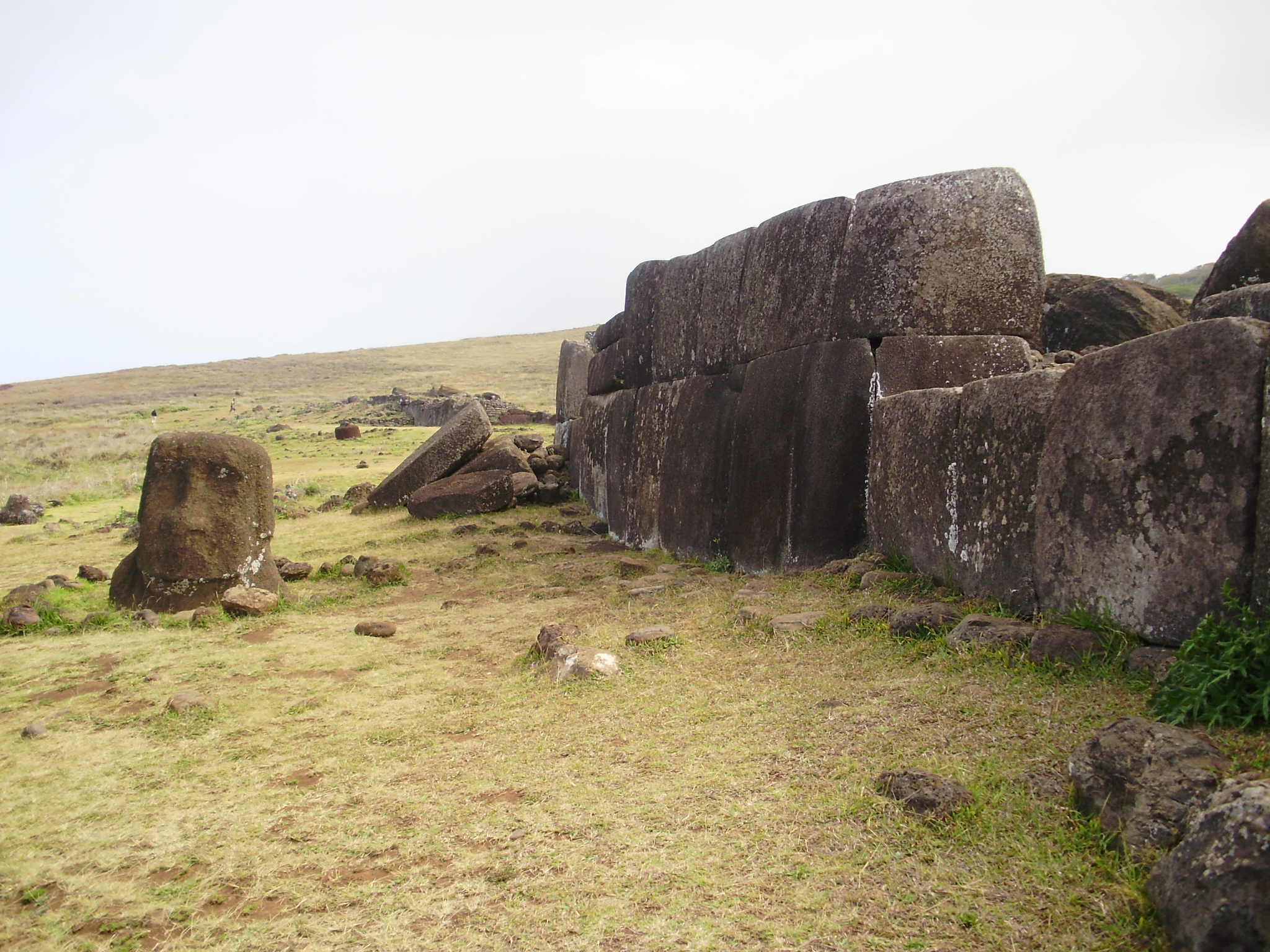 Ahu Vinapu, en Isla de Pascua, Chile.